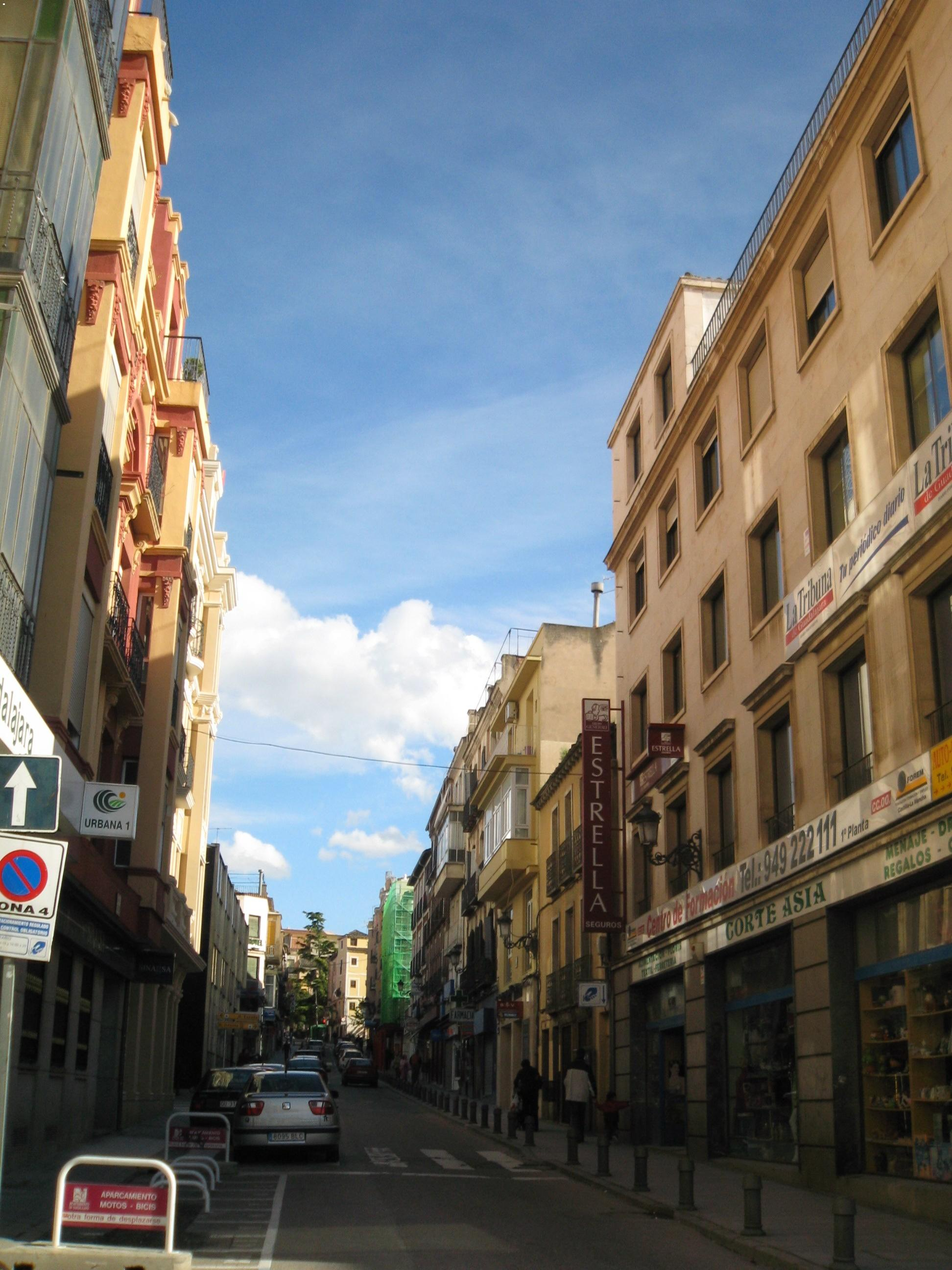 Miguel Fluiters Street in Guadalajara, Spain